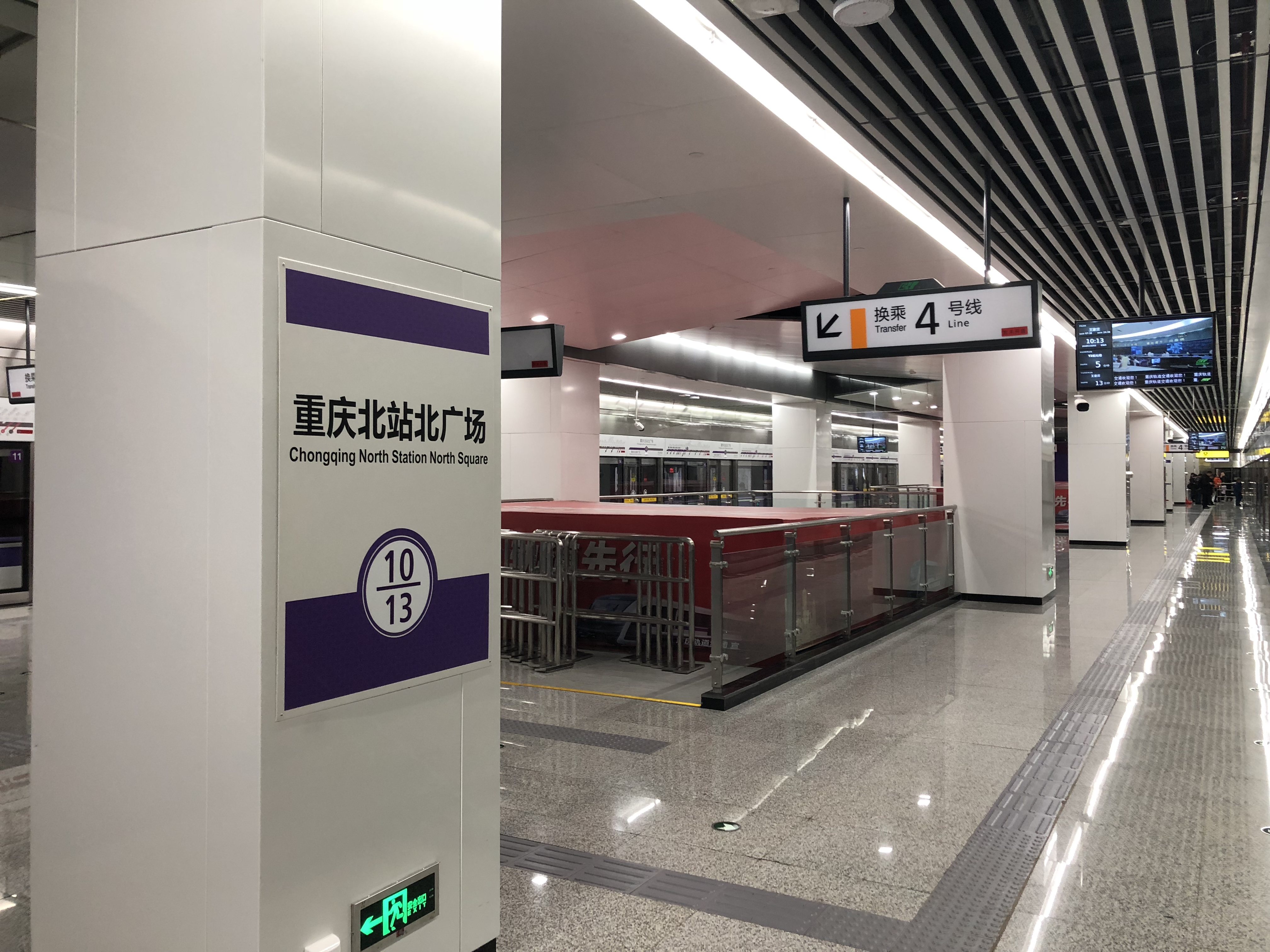 10 号线重庆北站北广场站